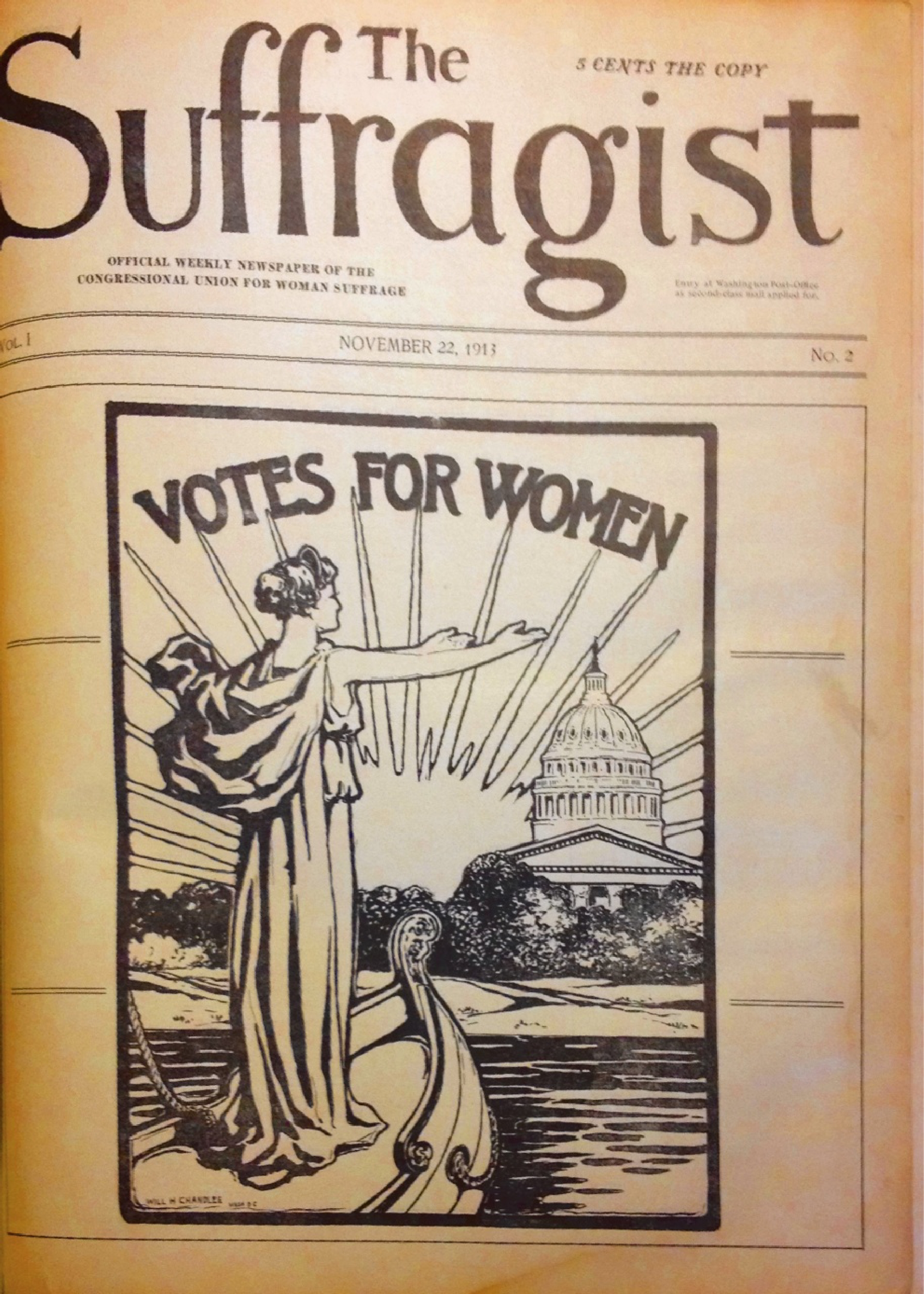 063 الصفحة الرئيسية لعدد 22 نوفمبر 1913من صحيفة "The Suffragist"